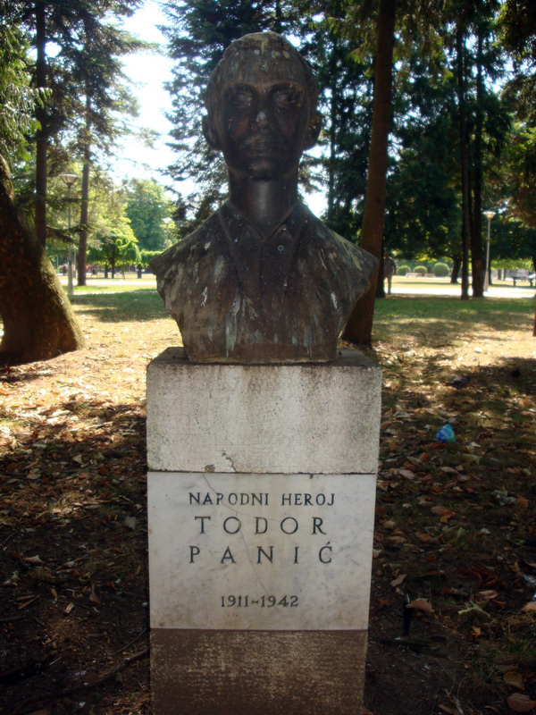 Тодор_Панић